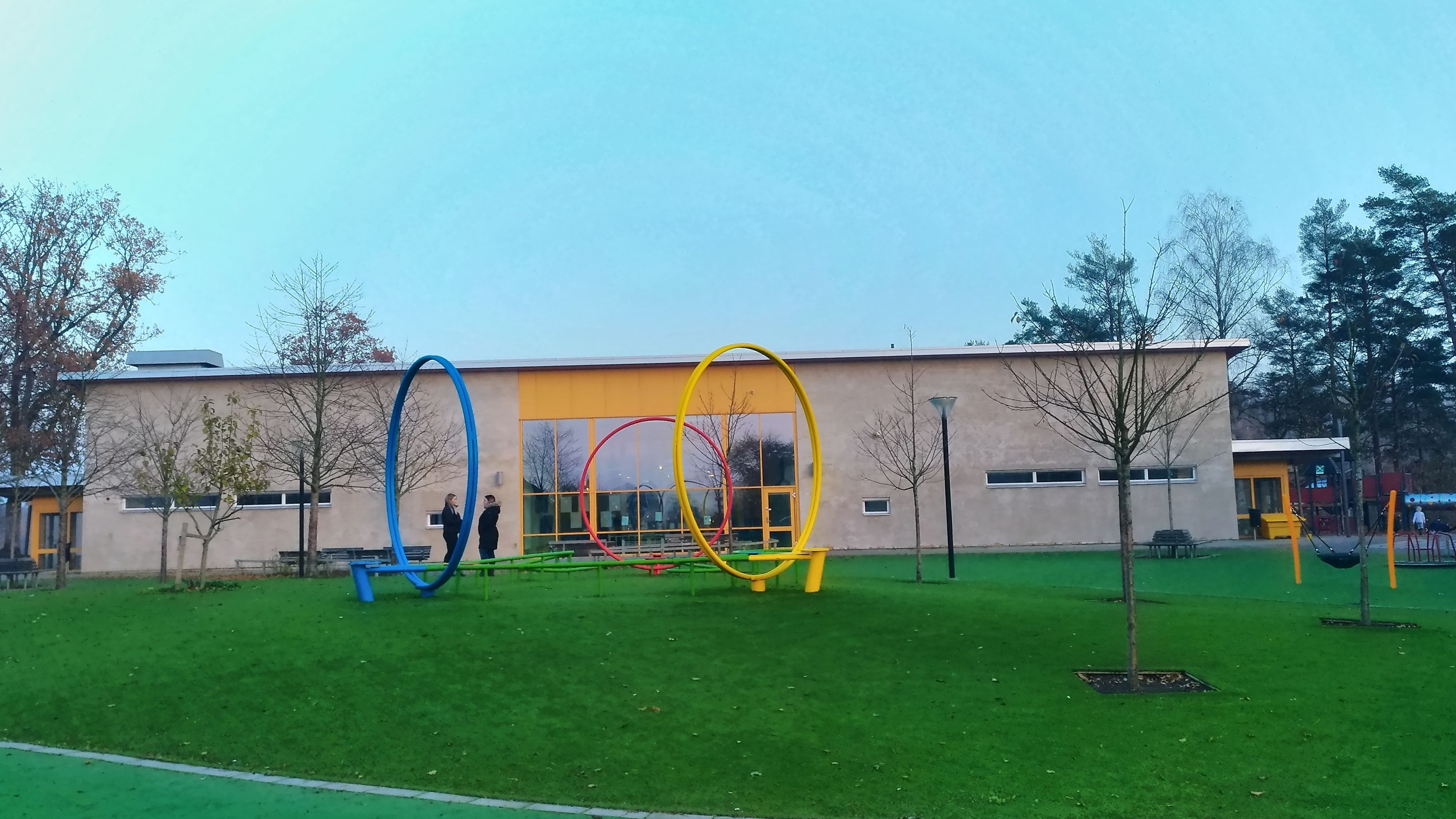 En offentlig gestaltning, Titel: Parkour.